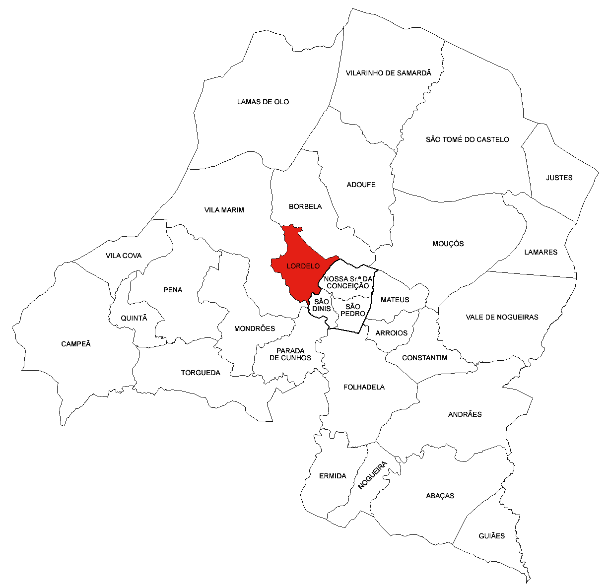 Freguesia de Lordelo (concelho de Vila Real)